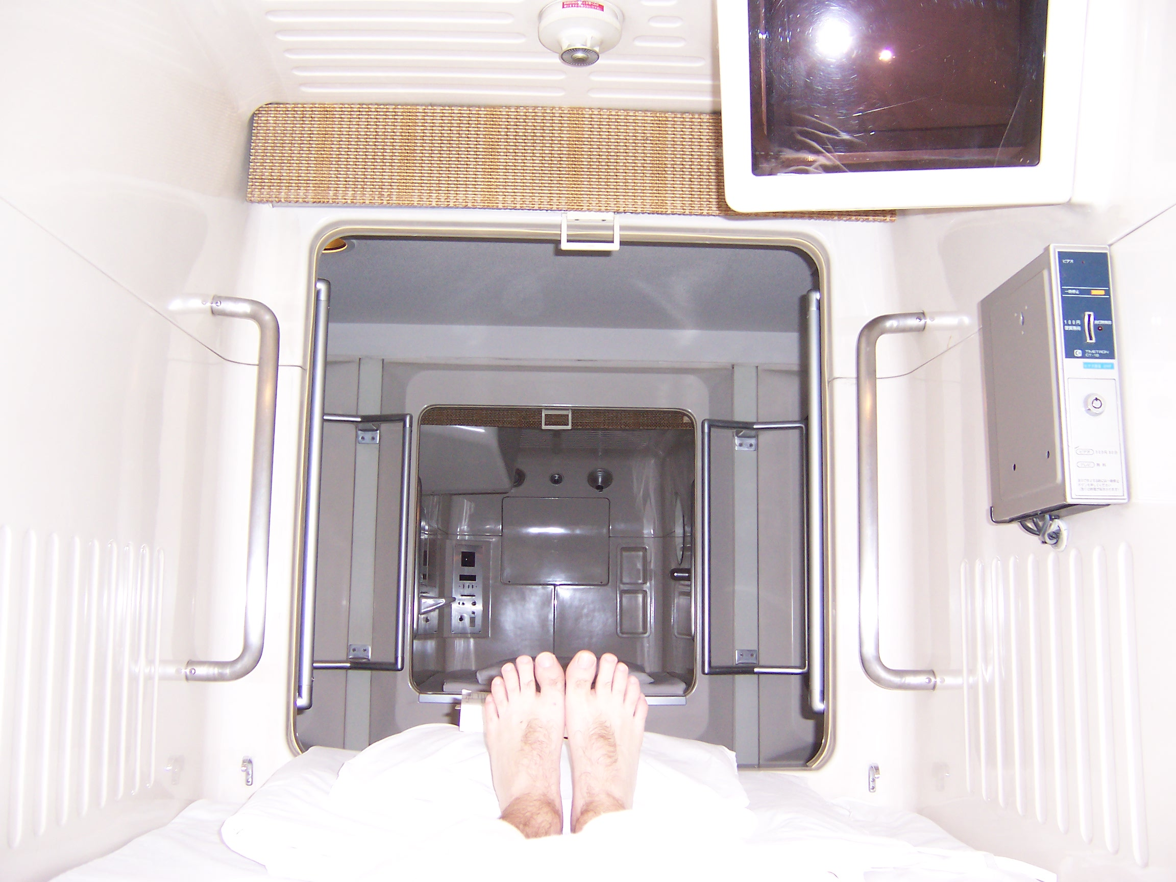 Intérieur d'un capsule hôtel à Osaka